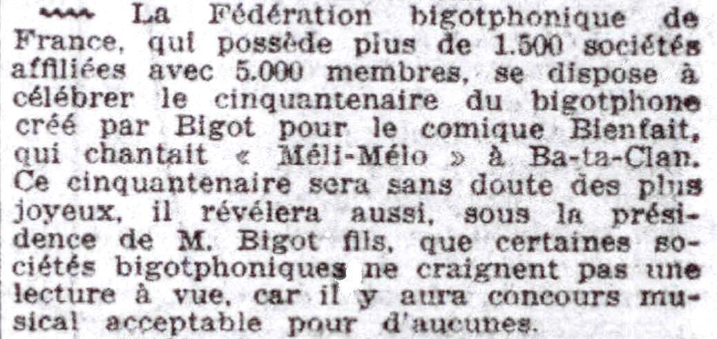 Article paru page 8, 7ème colonne, annonçant le cinquantenaire du bigotphone qui sera commémoré par la Fédération bigotphonique de France.